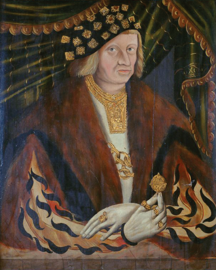 Portret van Günther XL van Schwarzburg(-Blankenburg)